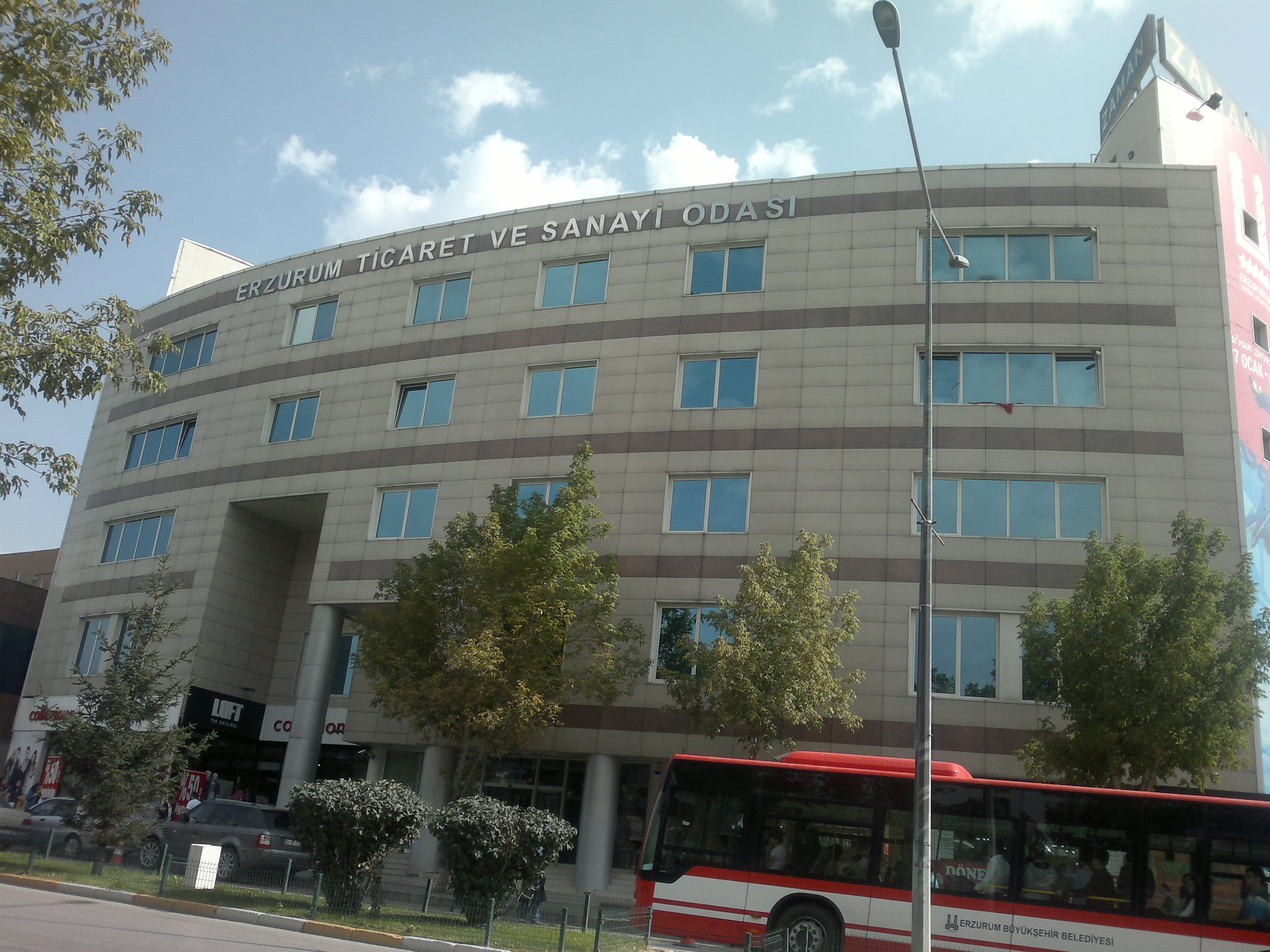 Erzurum Ticaret ve Sanayi Odası